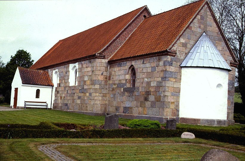 Tulstrup Kirke, Skanderborg Kommune - Tympanon over våbenhusets dør